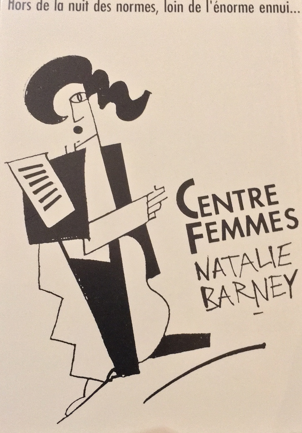 Visuel graphique pour le Centre Femme Nathalie Barney à Genève